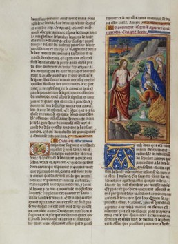 Feuillet d'un manuscrit orné de de 88 enluminures exemplaire de la Vie du Christ de Ludolphe de Saxe (dit le Chartreux ) provenant des collections de la Maison de Lorraine, réalisé pour la duchesse Philippe de Gueldres épouse du duc René II.